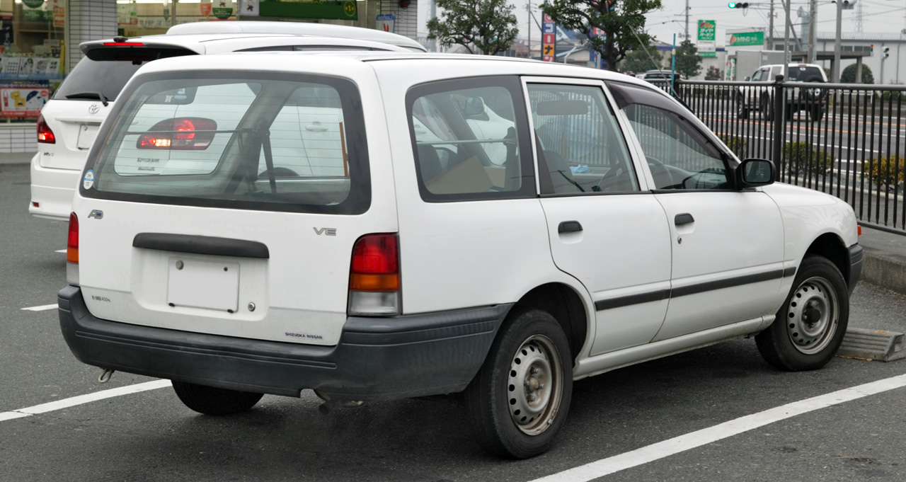 Nissan AD Van 1.5 VE ( Y10 )